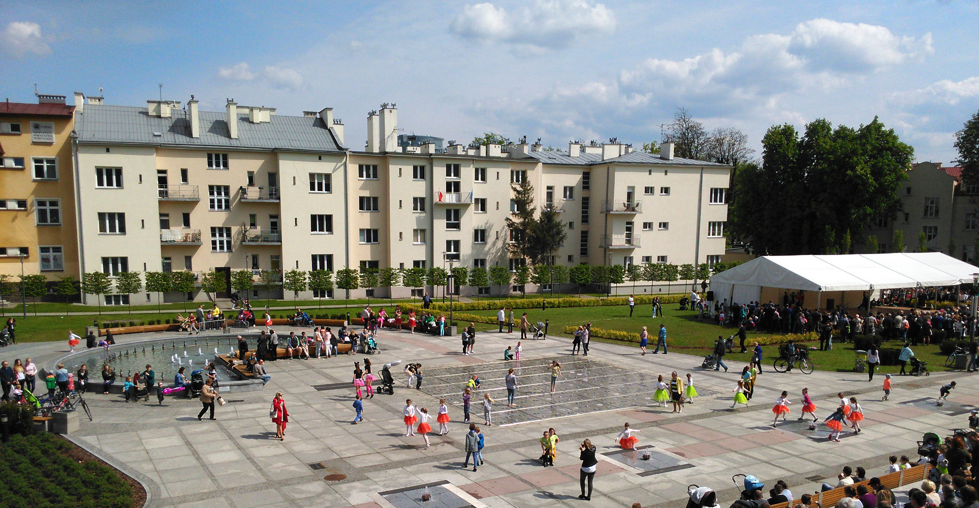 Fontanna Multimedialna w Rzeszowie - zdjęcie z dnia 3 maja 2016 roku.